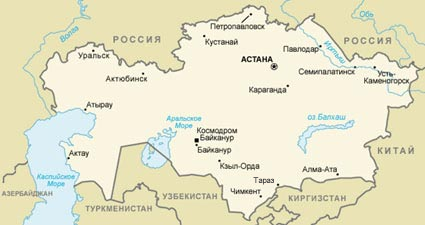 Kazakhstan